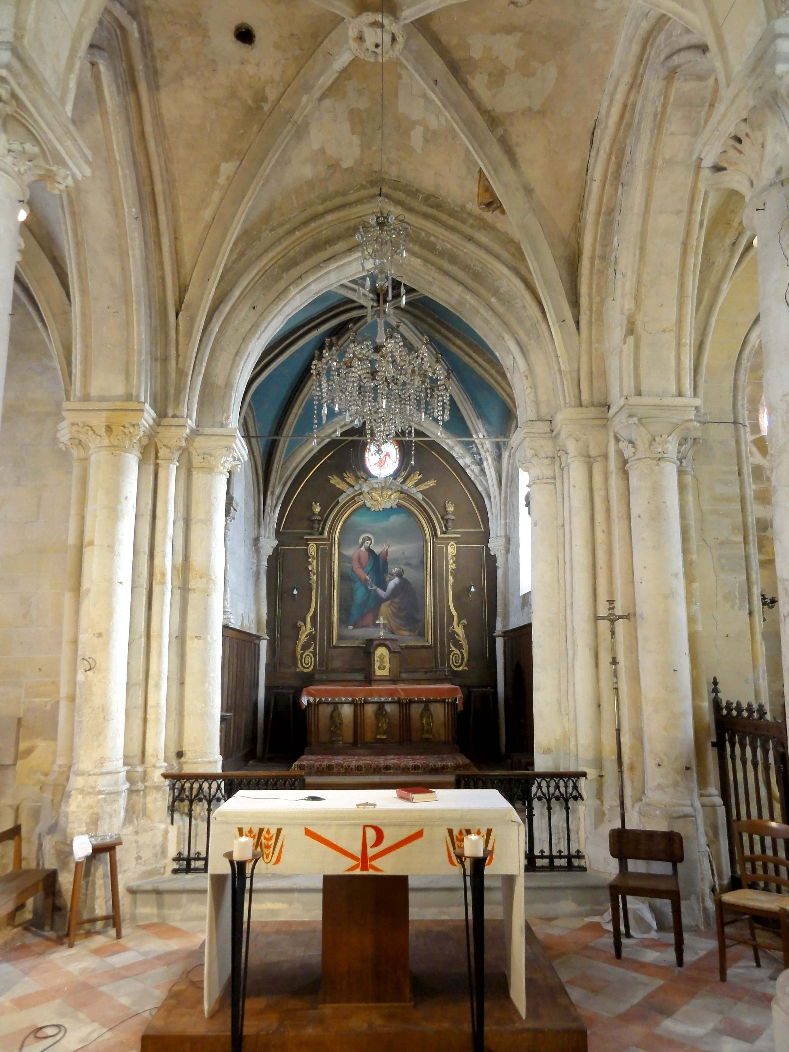 Intérieur de l'église - voir titre.